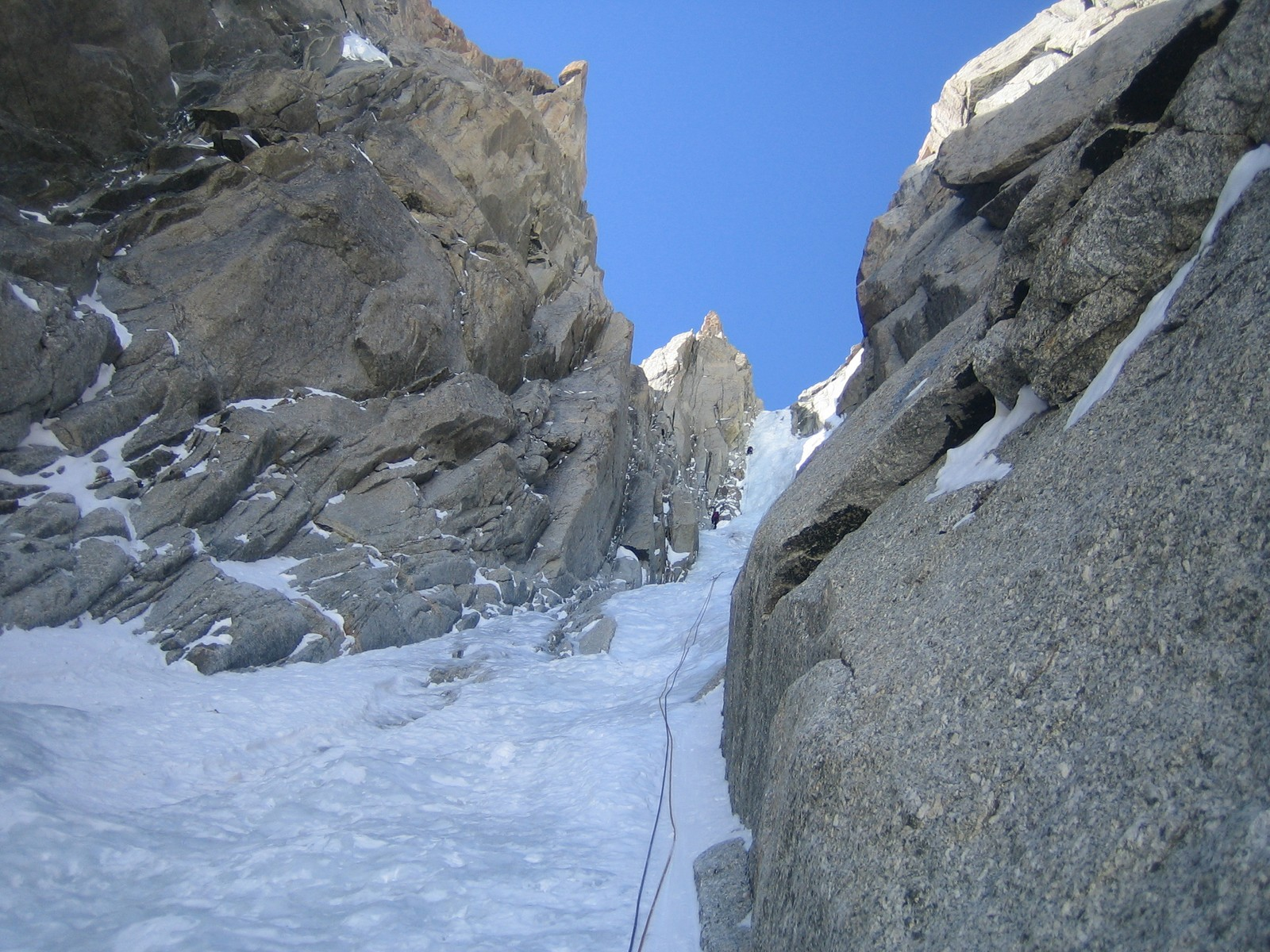 la sortie des goulottes